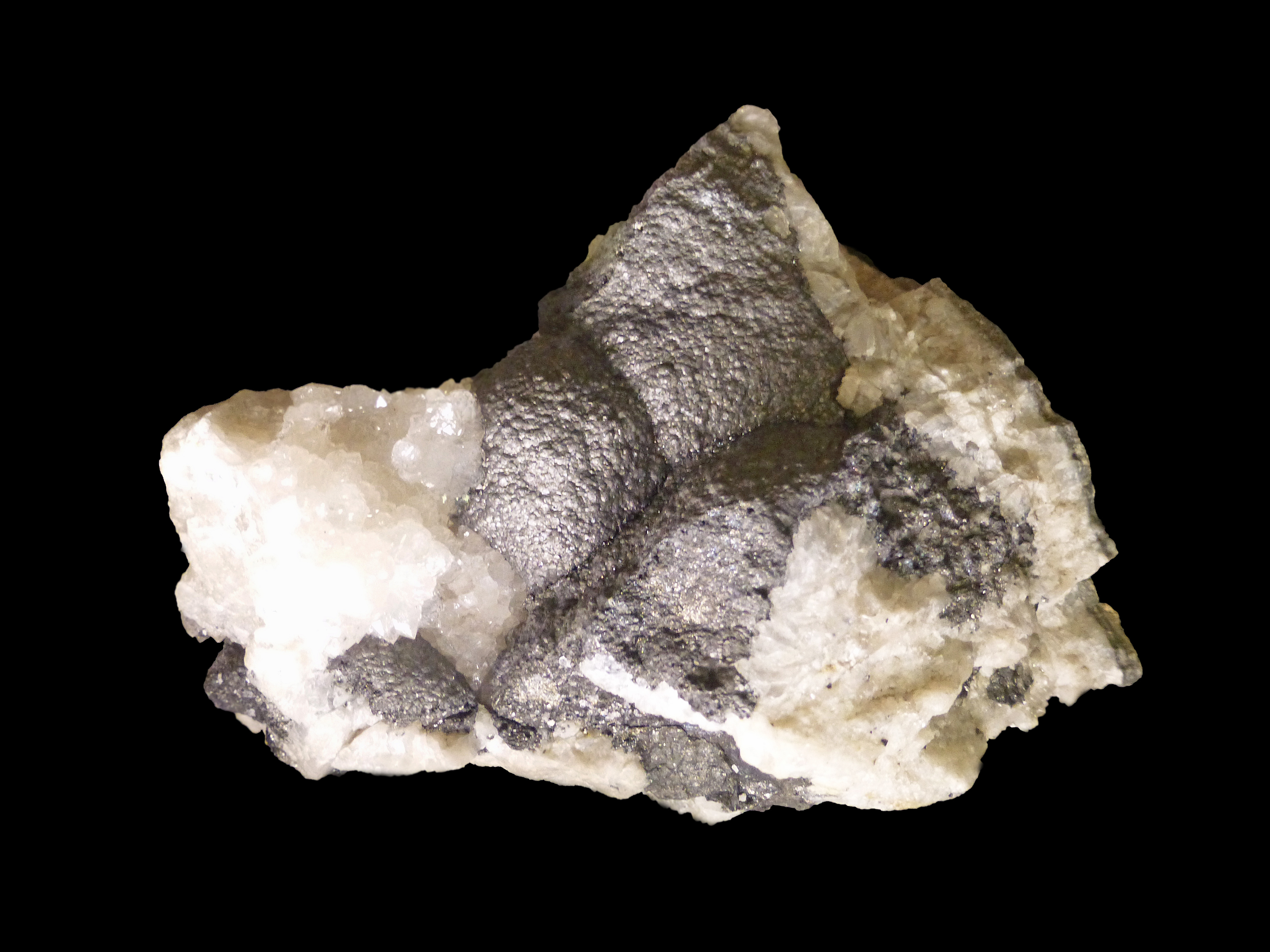 Arsenic natif. Rognons tapissés de cristaux (Sainte-Marie-aux-Mines, Haut-Rhin). Musée de minéralogie de Strasbourg